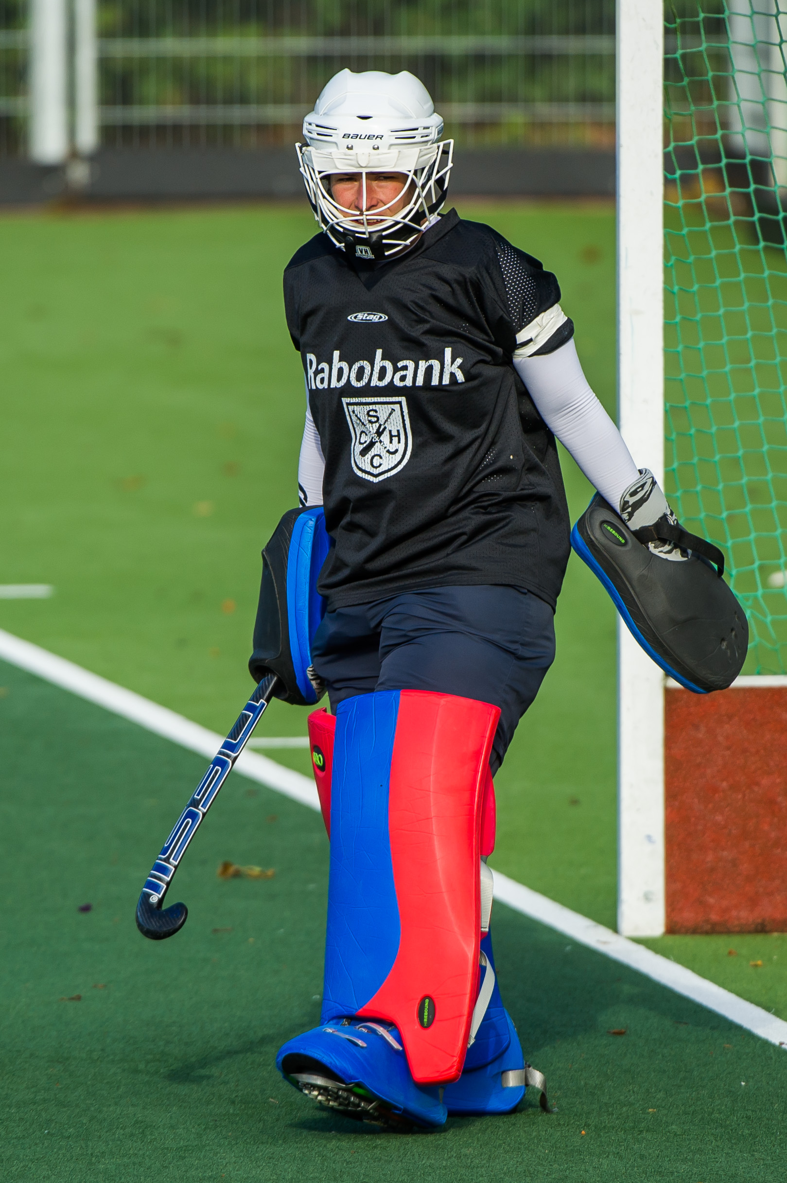 Inge Vermeulen, doelverdedigster van SCHC, tijdens de hockey Hoofdklasse wedstrijd AHBC - SCHC op 2-11-2014